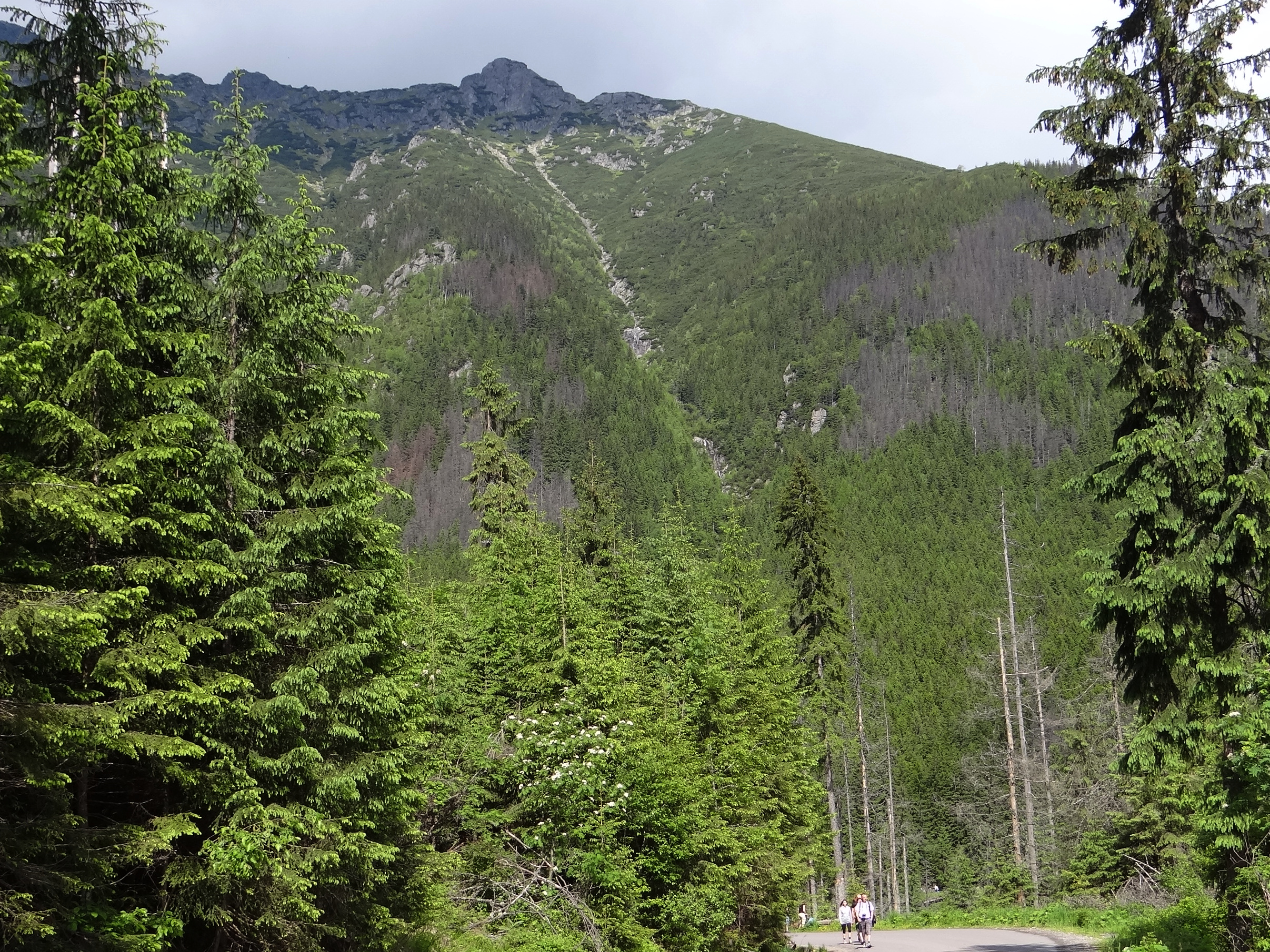 Widok z Drogi Oswalda Balzera na Turnię nad Dziadem i Siwarny Żleb